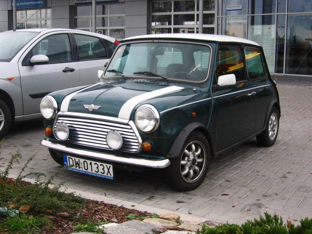 Mini 1000